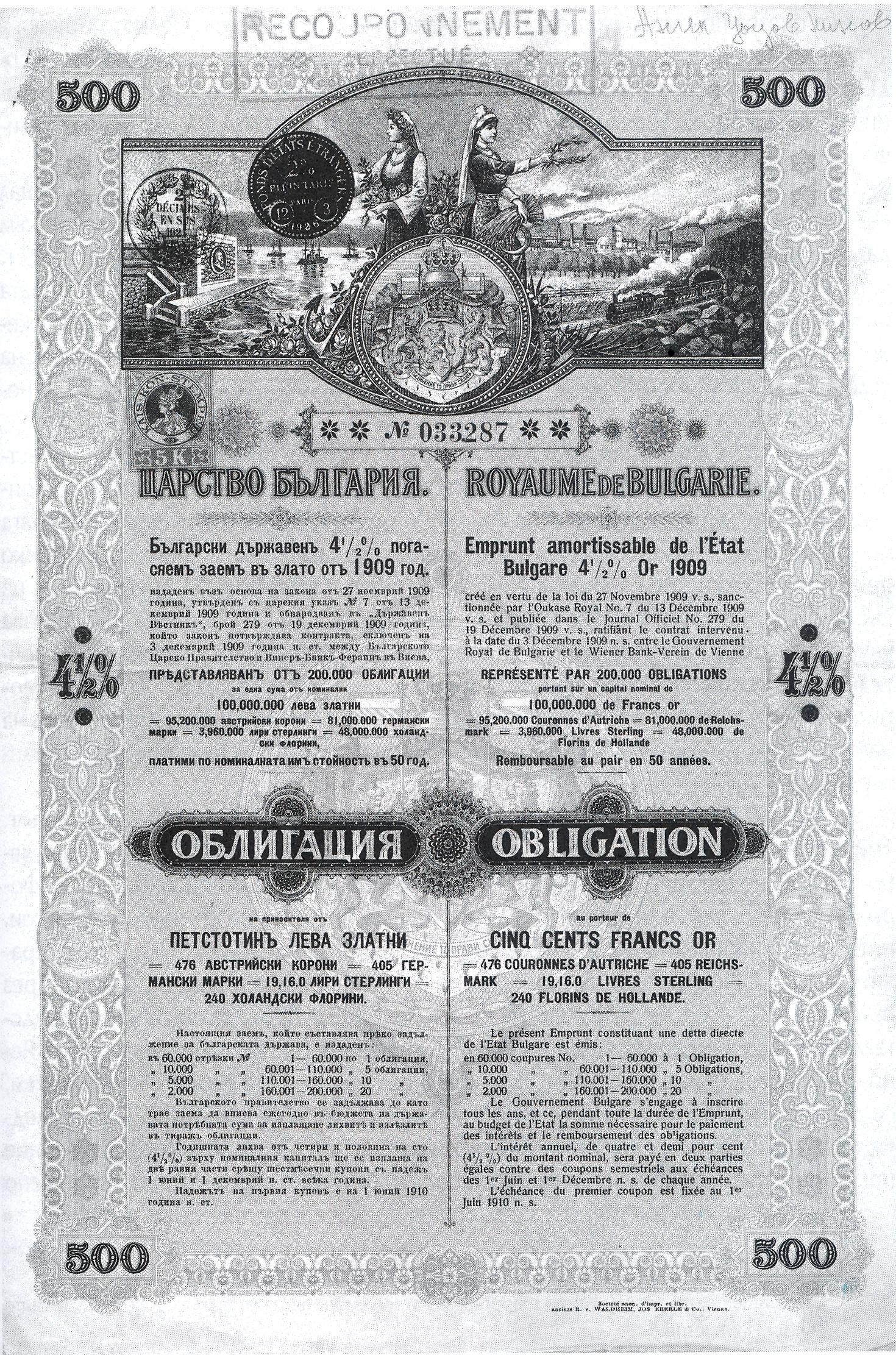 Българска държавна облигация от 1909 година